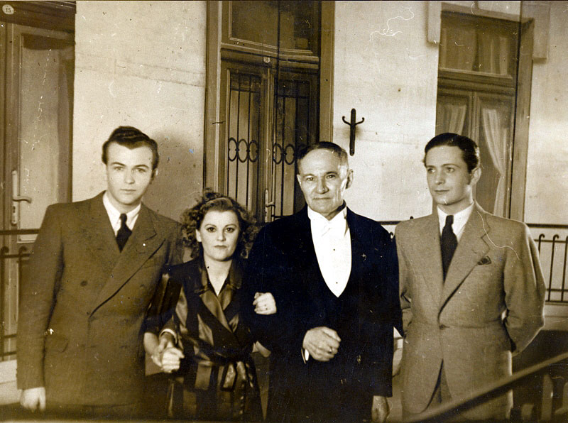 Hevesi Sándor: A bűvészinas. Belvárosi Színház, 1938. Somogyvári Rudolf (Récsey Viktor, zongoraművész), Turay Ida (Marianne), Hevesi Sándor, a szerző, Szilassy László (Kemény Pál, újságíró) a bemutató után.